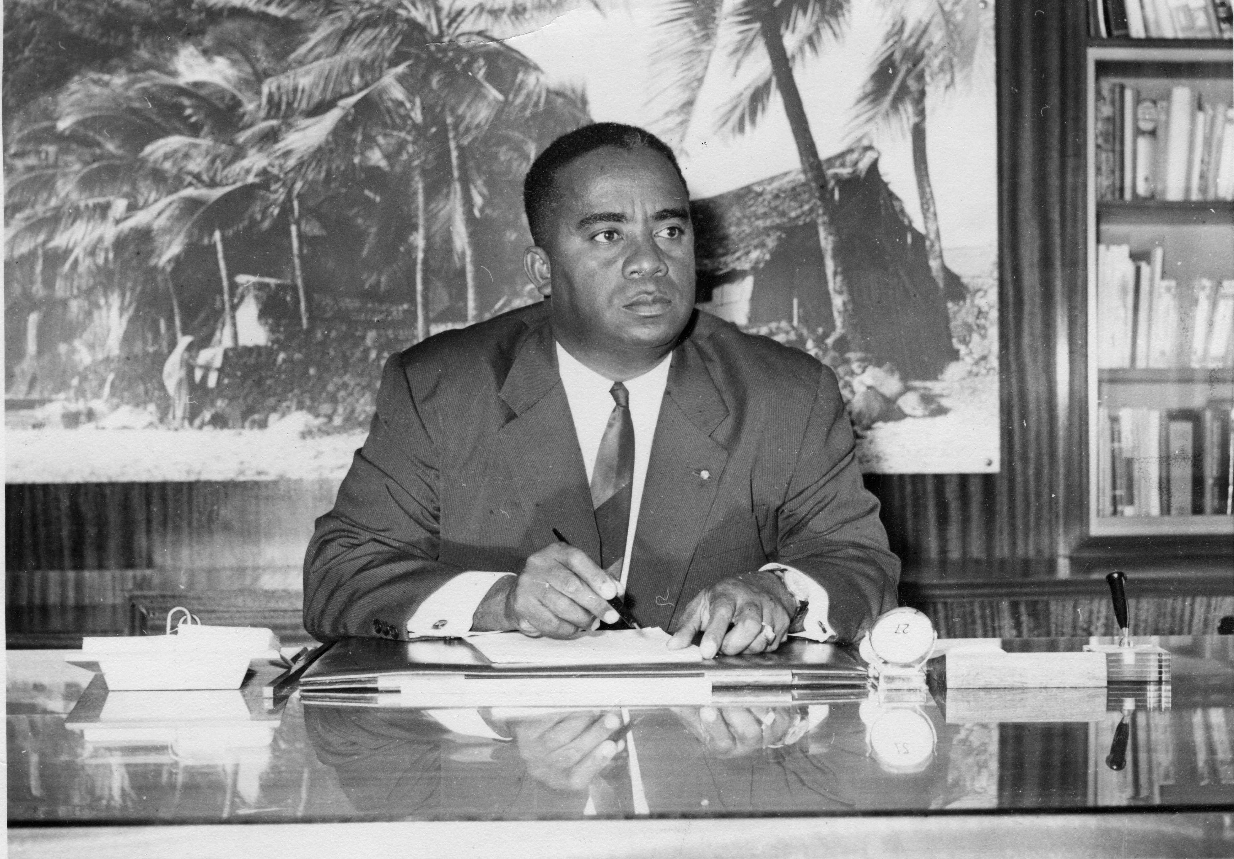 Dans son bureau au ministère de l'intérieur à Antananarivo